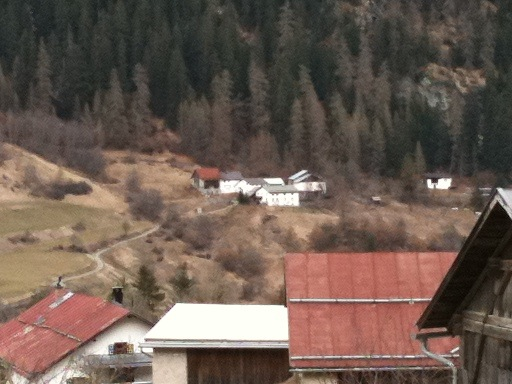 Raschvella, Ort im Unterengadin (Kanton Graubünden)